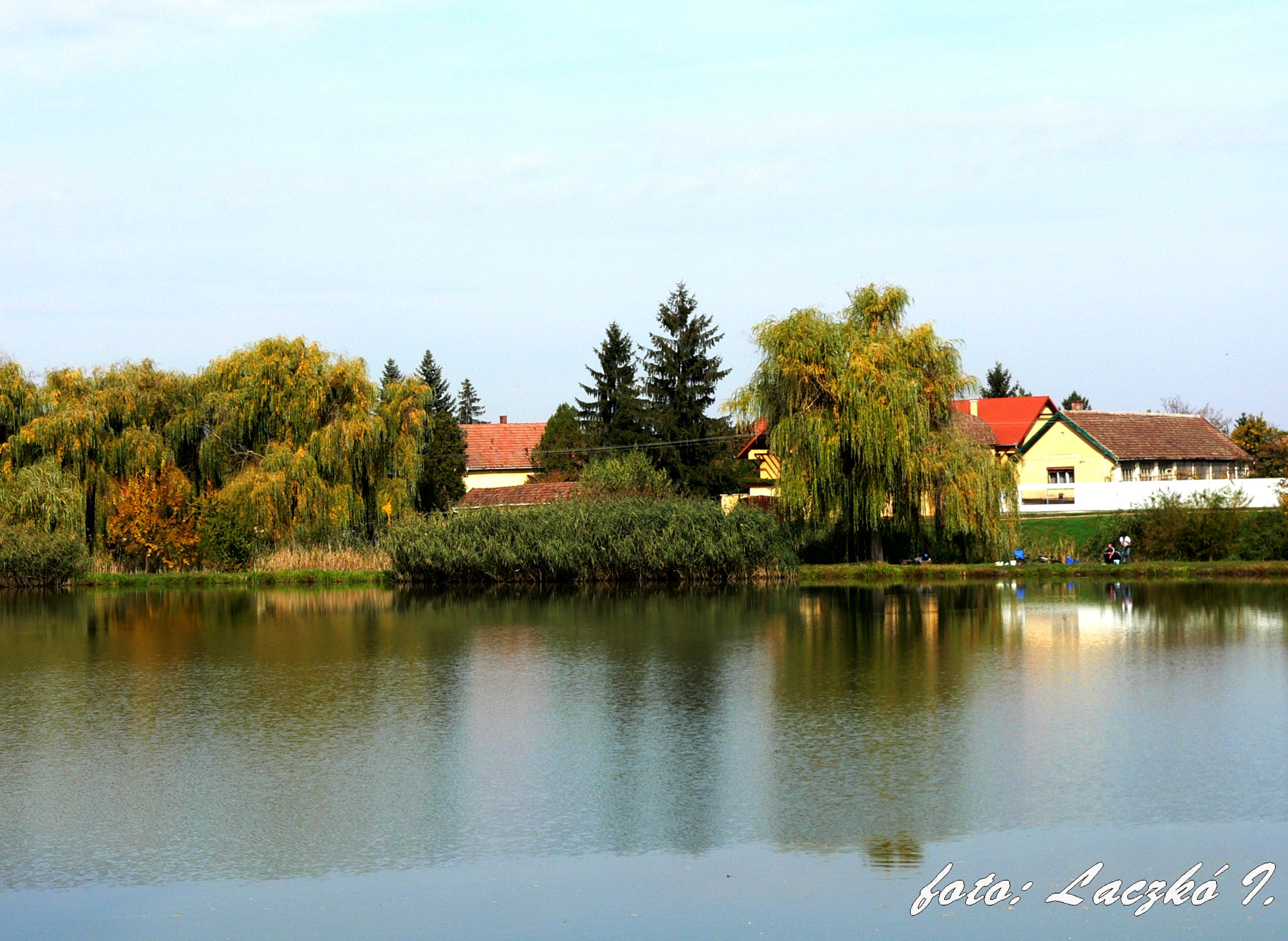 Sarklad Éden-tó látkép